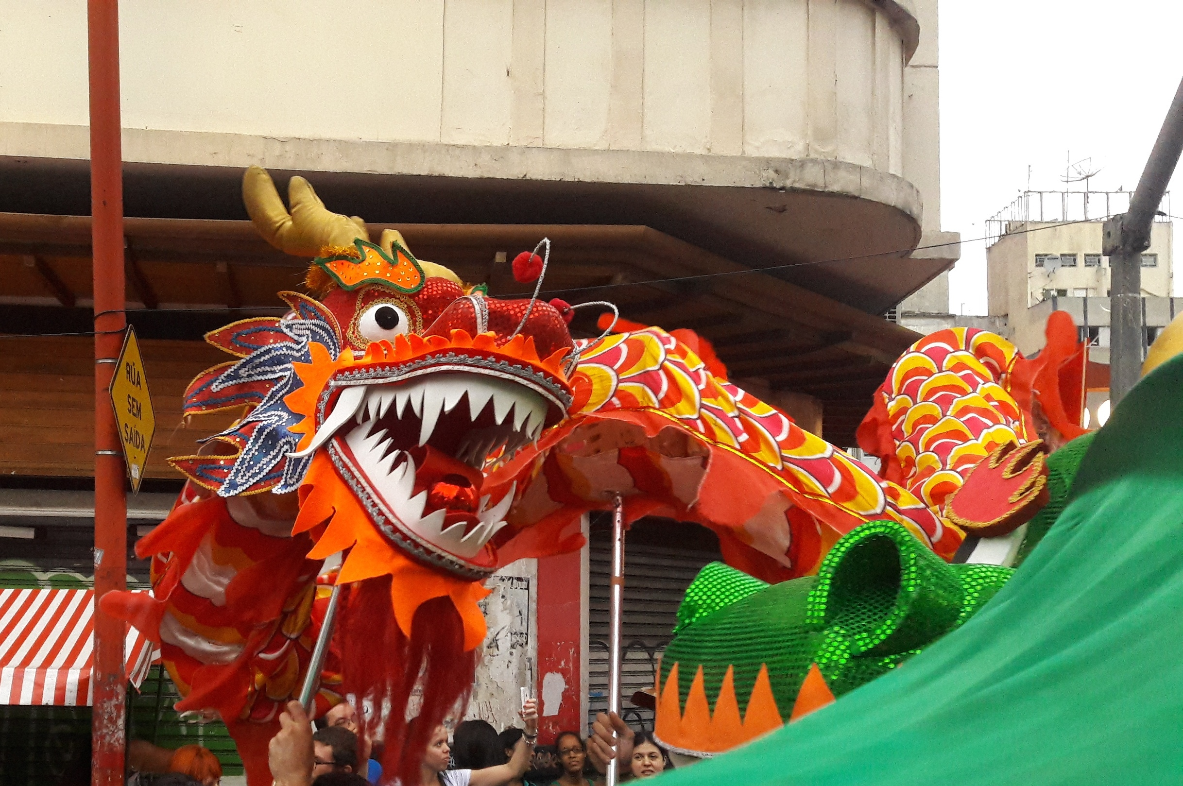 12ª Festa do Ano Novo Chinês na Liberdade, ano do Galo, dança do Dragão.